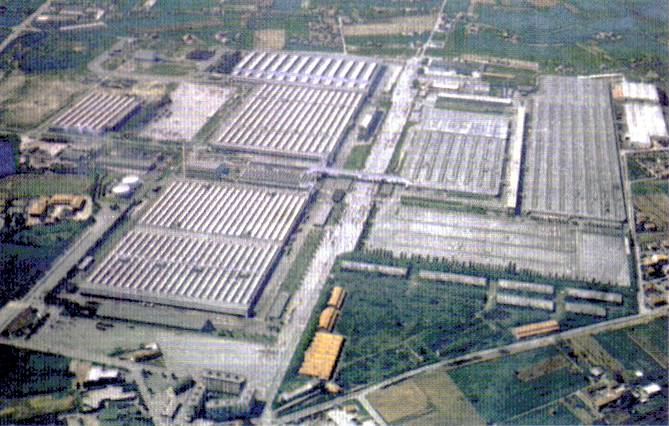 Le fabbriche automobilistiche FIAT di Torino.